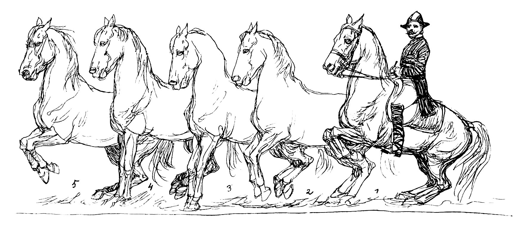 Mezair